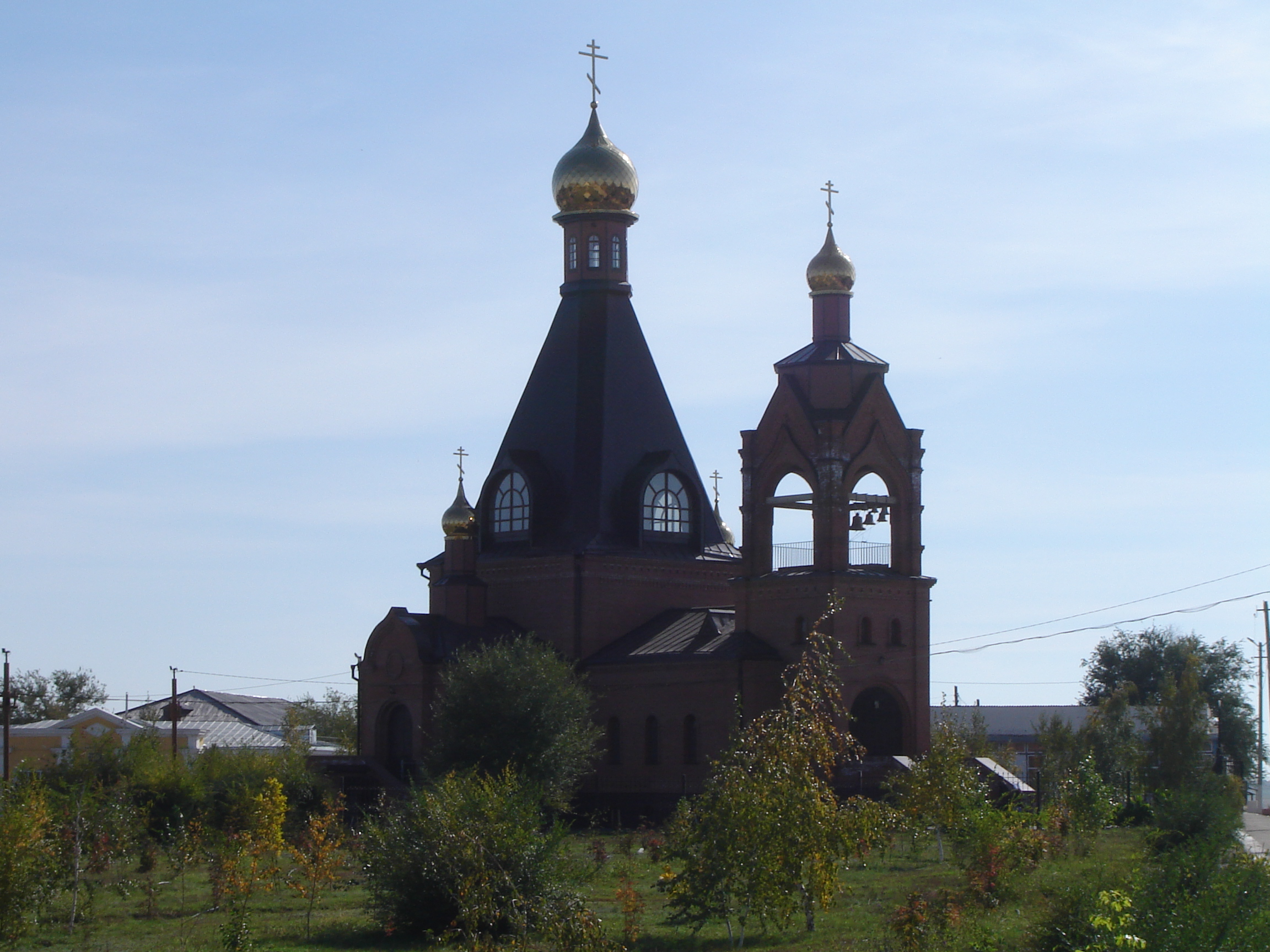 Фёдоровская церковь в посёлке Озинки, построенная в 2015 году